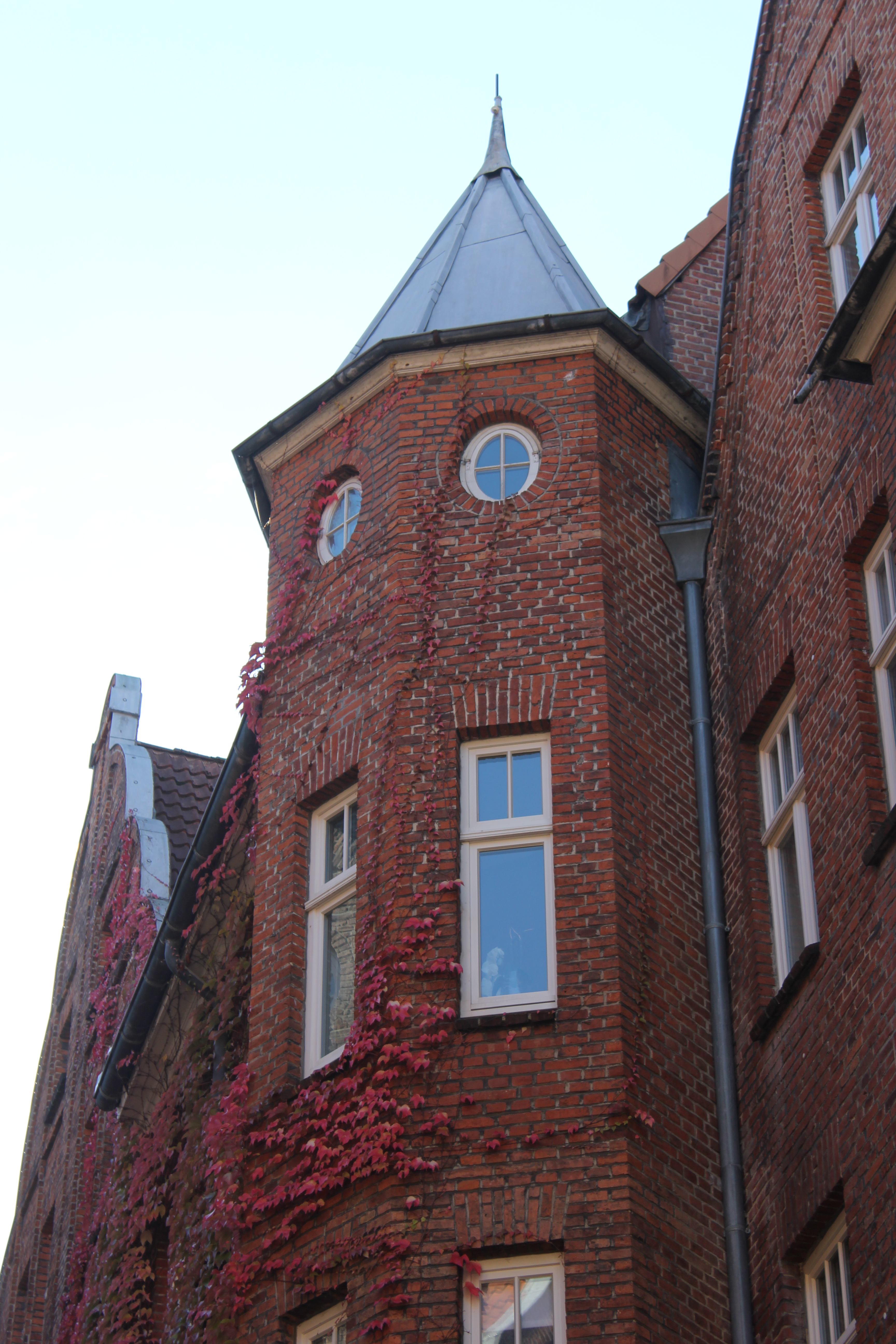 Burghof Flensburg, Großer Innenhof, Südturm, Bild 01